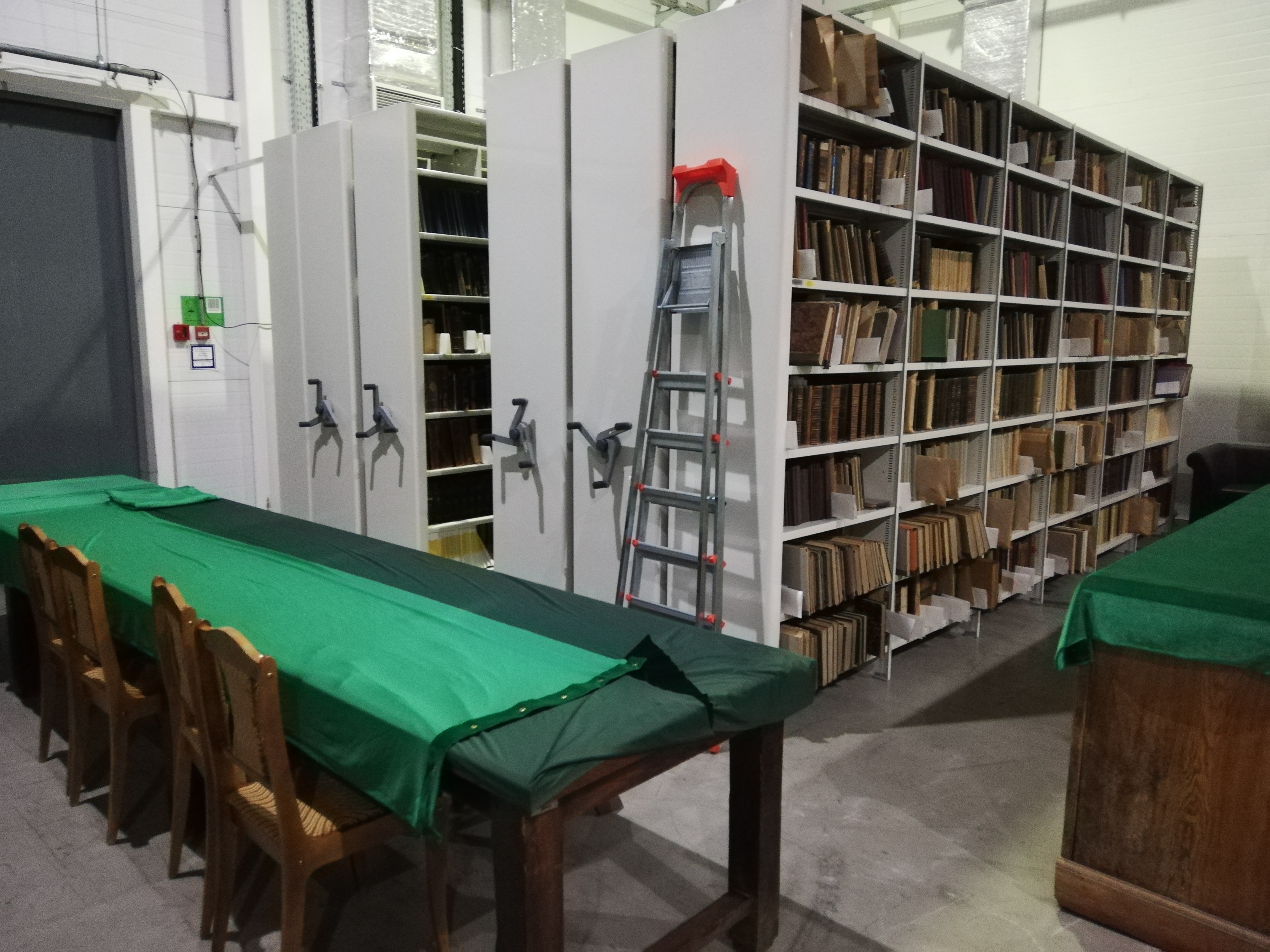 Временное хранилище библиотеки Политехнического музея в технополисе на АЗЛК, историческая мебель